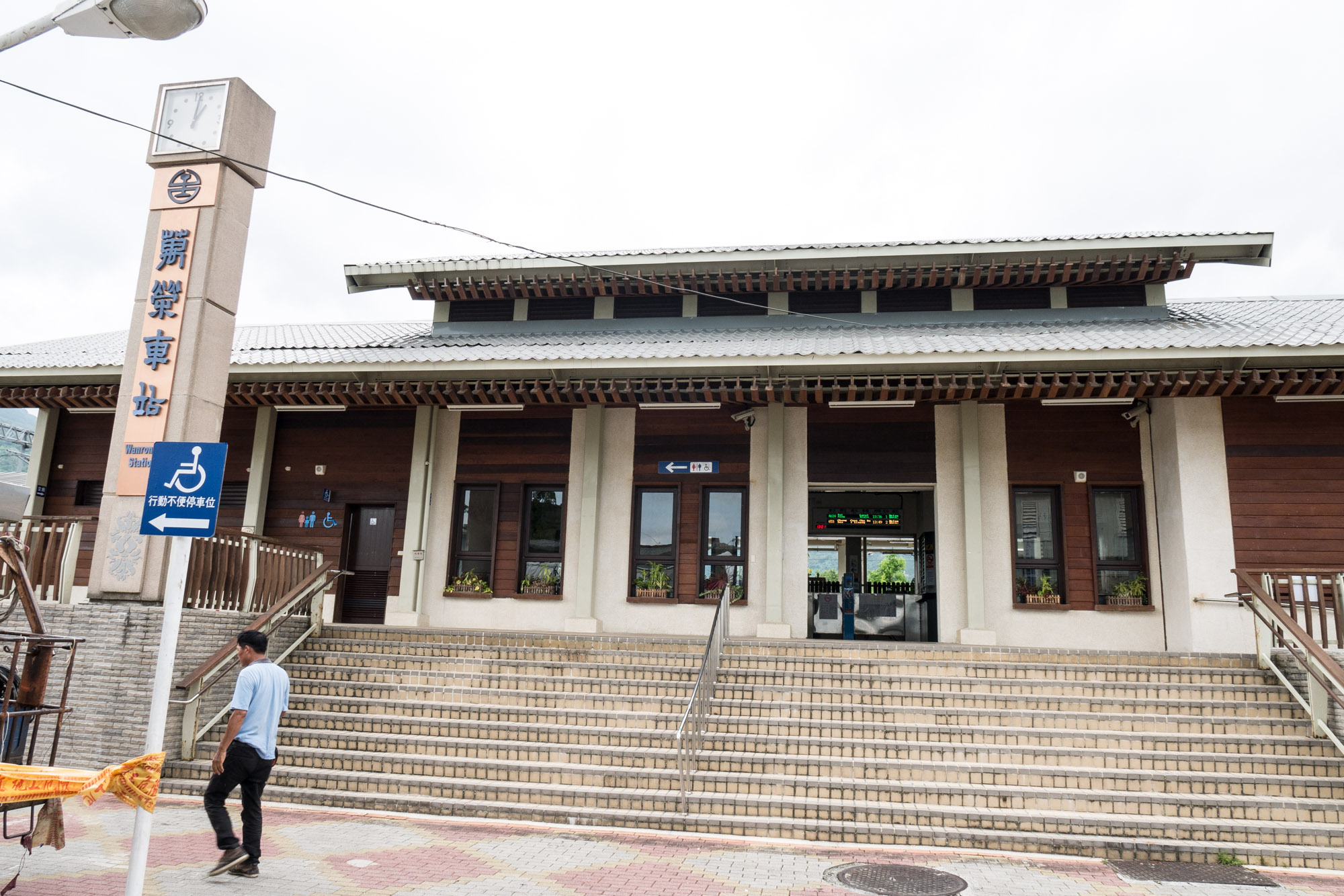 萬榮車站